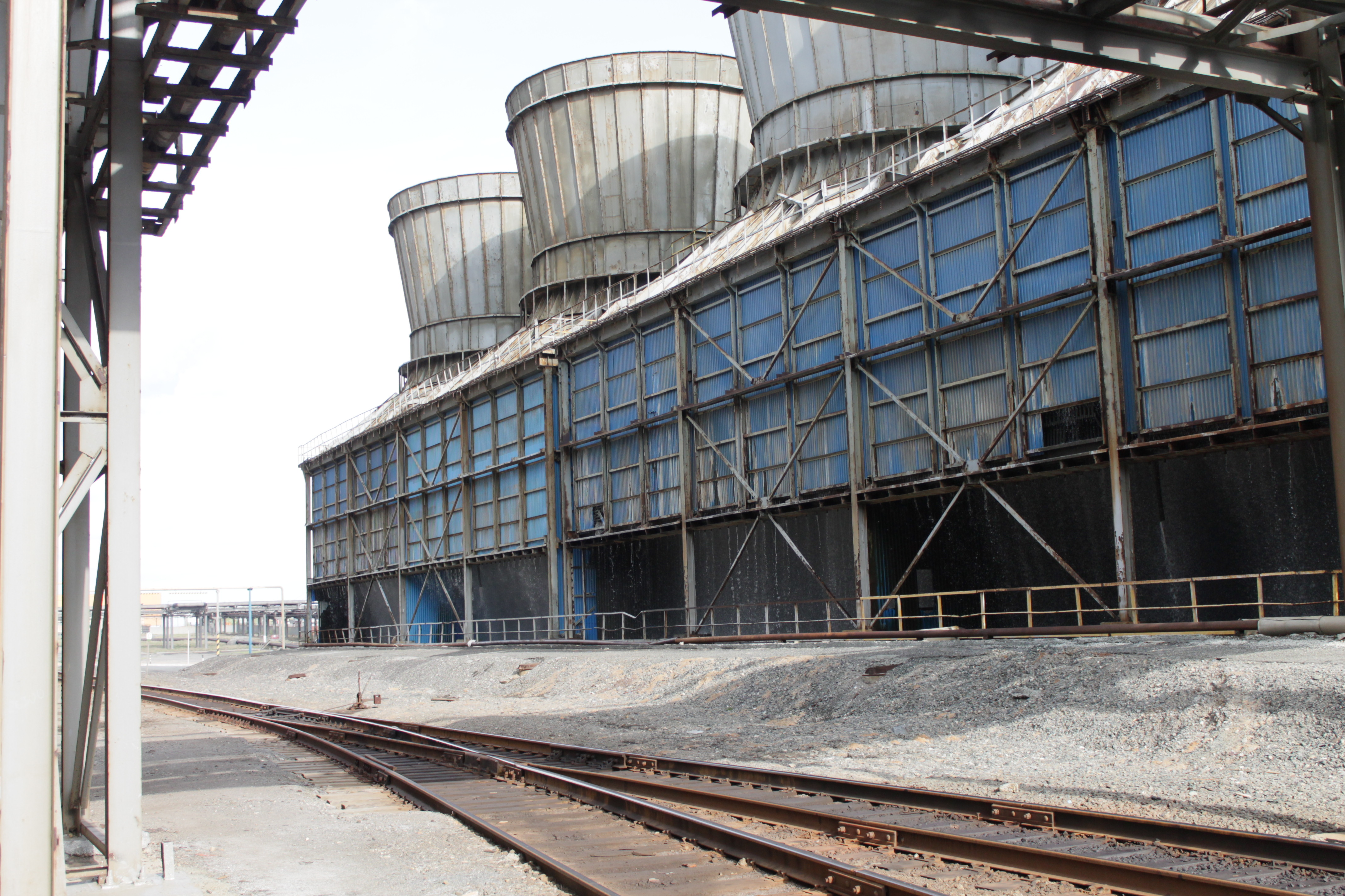 СУМЗ. Градирни кислотного цеха